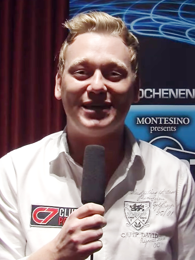 Jens Knossalla als Pokermoderator im Montesino Card Casino Wien